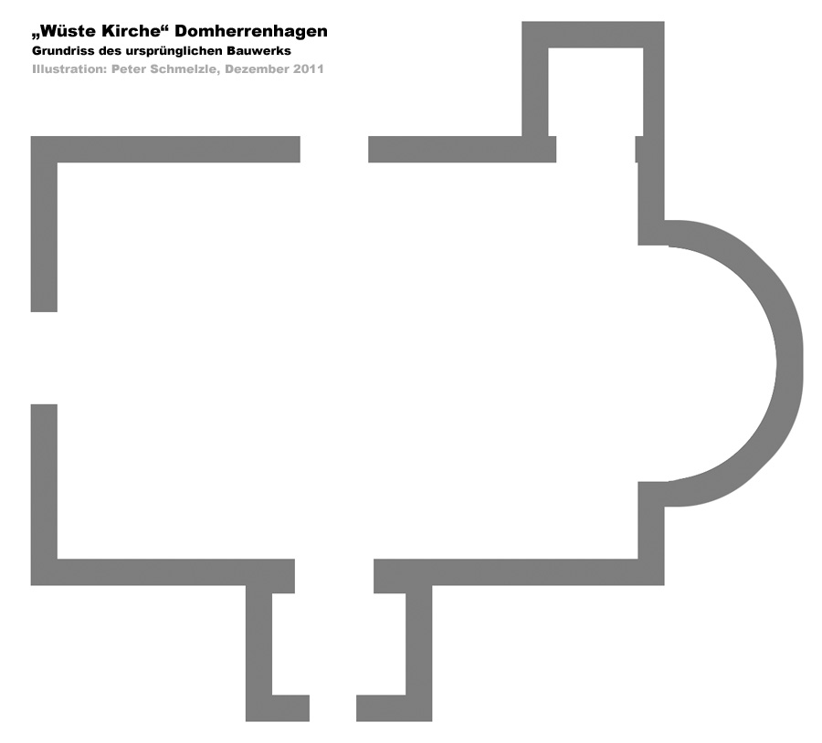 Grundriss-Skizze der Wüsten Kirche Domherrenhagen (erstellt nach Vorgabe auf Infomaterial vor Ort)